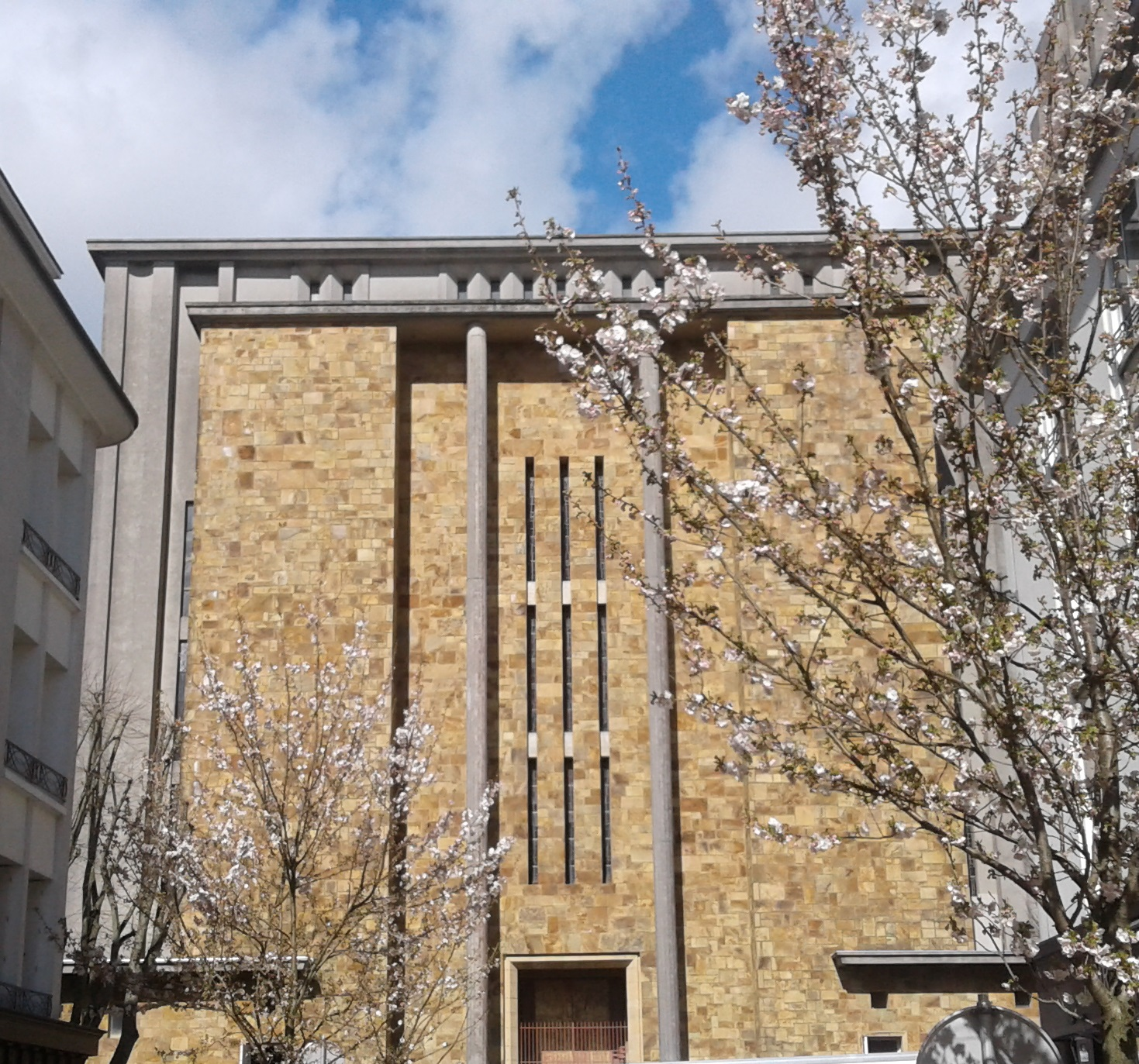 Nouvelle église Saint-Louis de Brest, Finistère, Bretagne, France